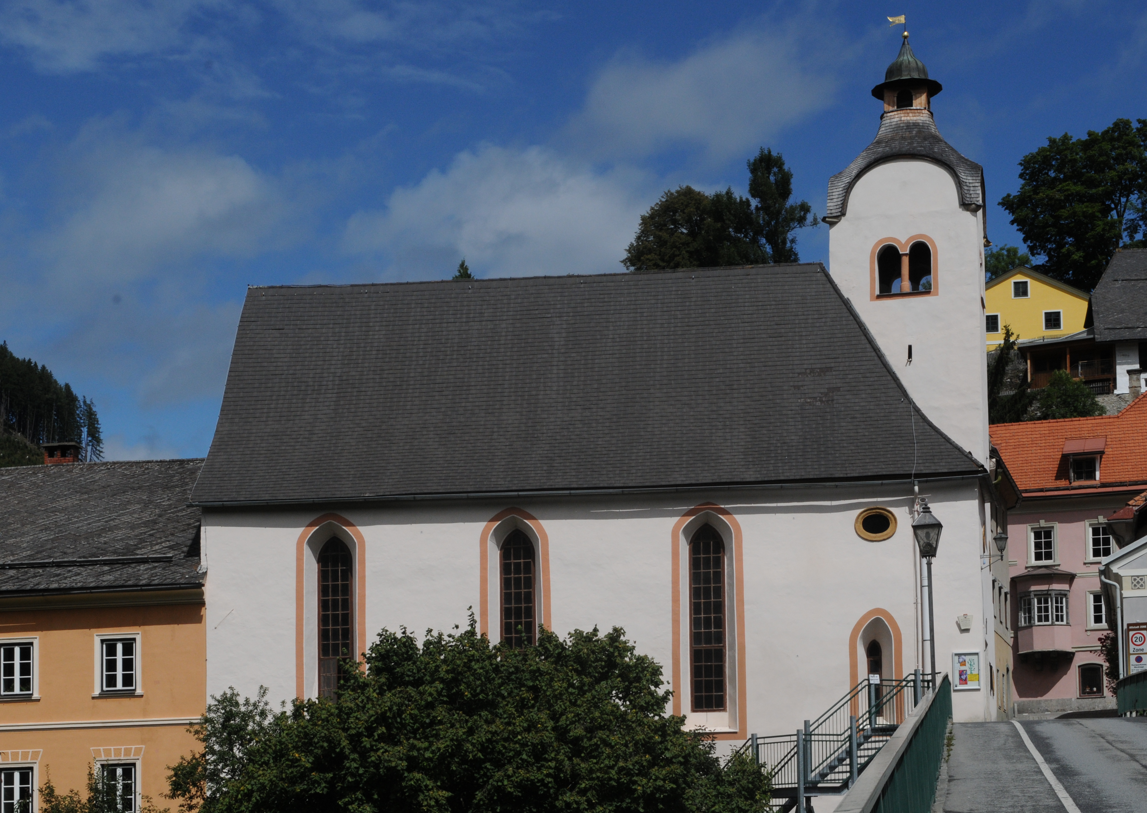 Evangelische Elisabethkirche in Murau - Blick von der Murbrücke auf die Kirche.